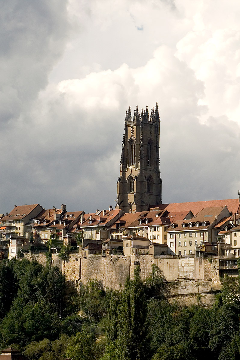 Cathédrale de Fribourg vue depuis la basse ville.